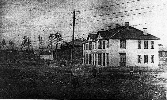 Первые дома в посёлке Тайгинка